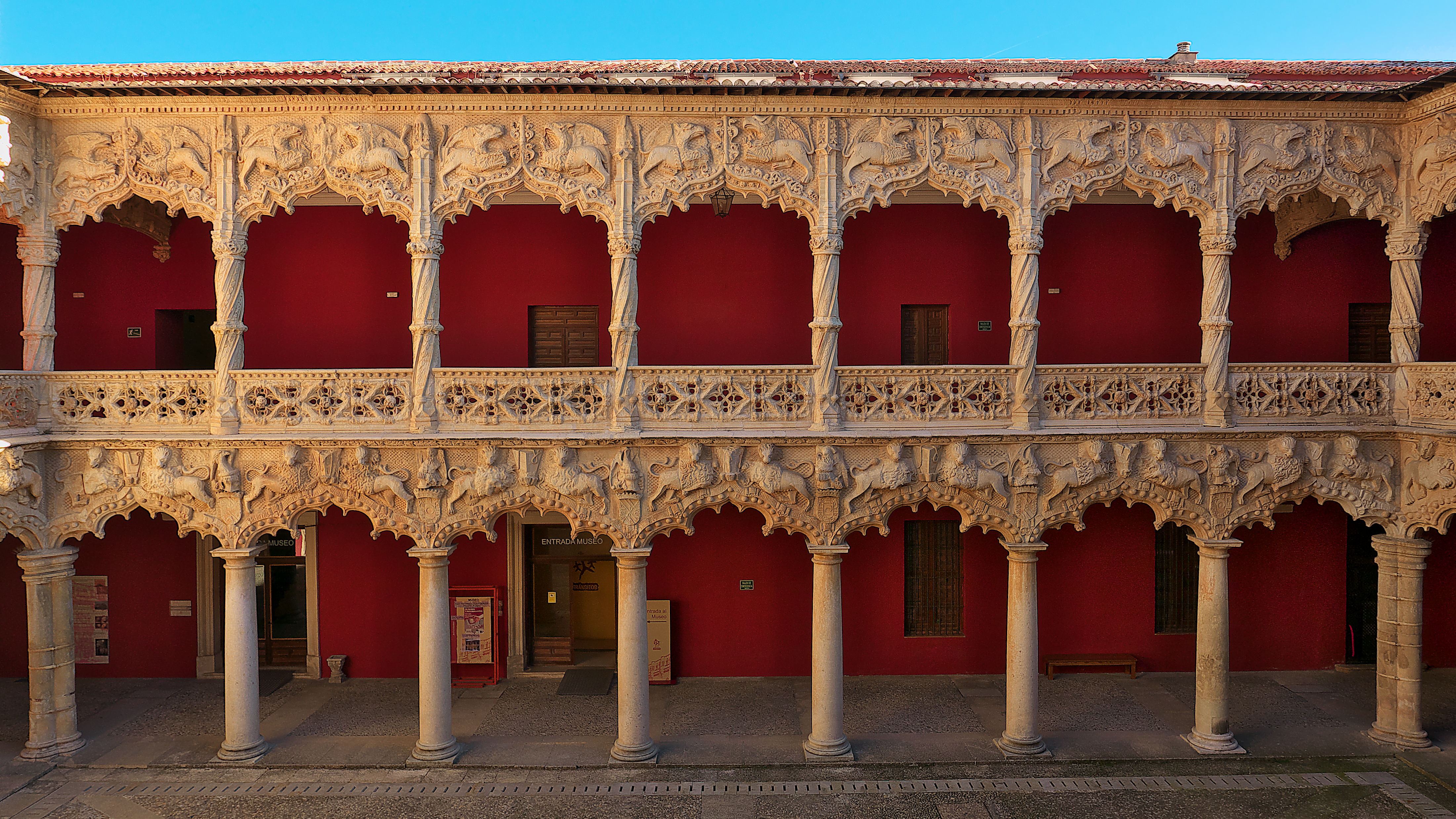 El apoyo total de Íñigo López de Mendoza al maestro Juan Guas ocasionó esta maravilla del arte español (1483), hoy con ciertas modificaciones.